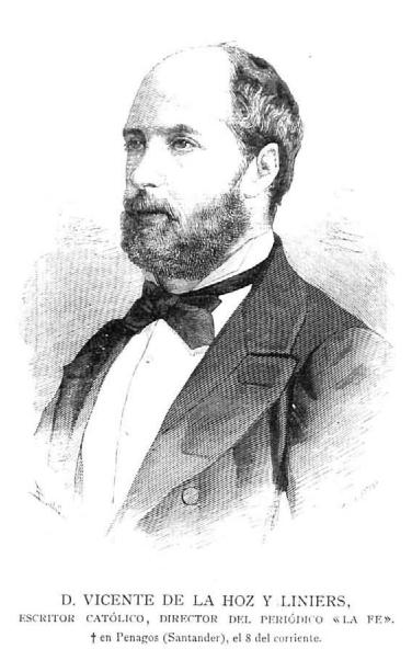 Retrato de Vicente de la Hoz y Liniers, publicado en la revista española La Ilustración Española y Americana.